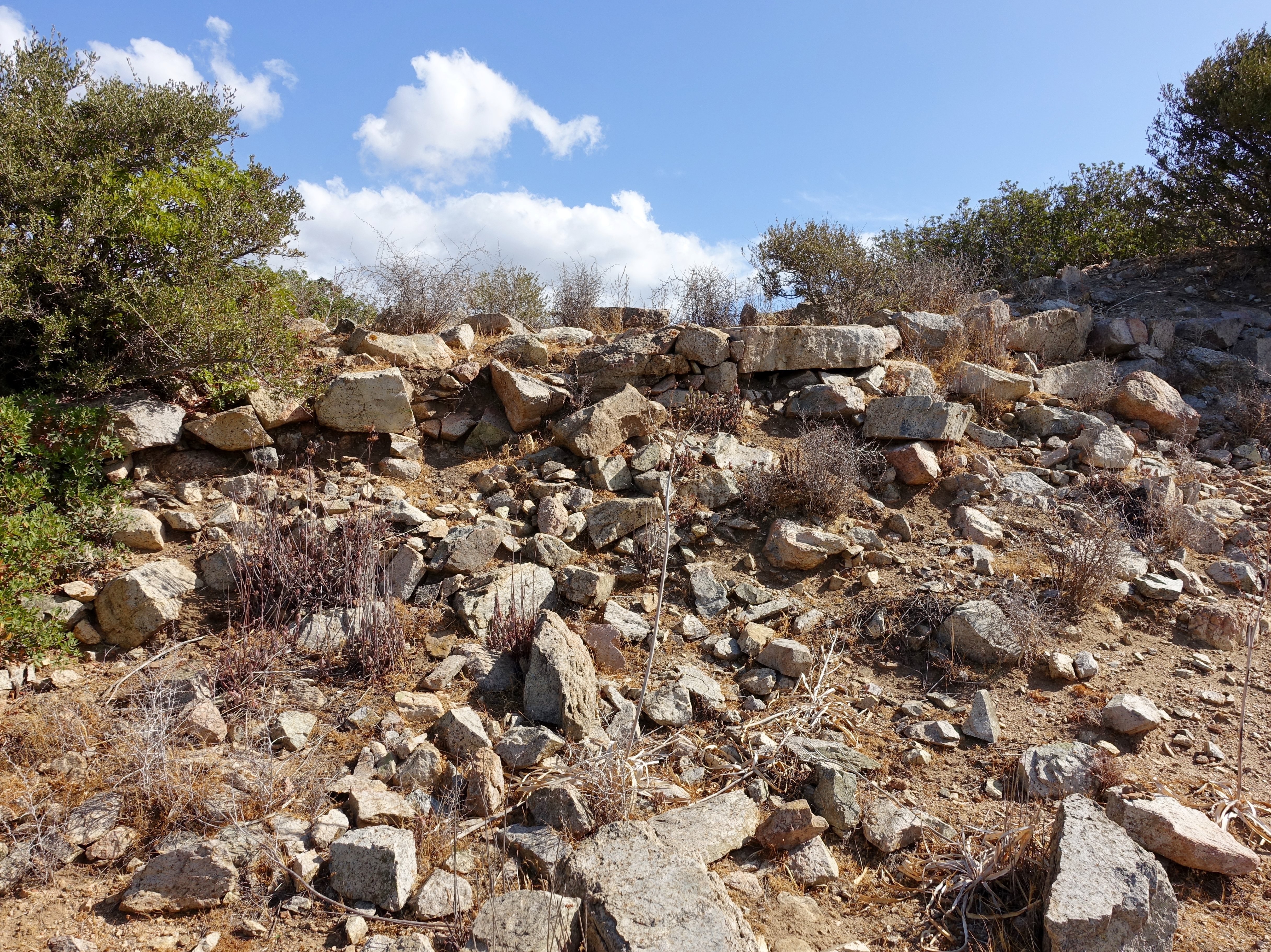 Phönizisches Heiligtum von Cuccureddus, Gemeinde Villasimius, Sardinien, Italien